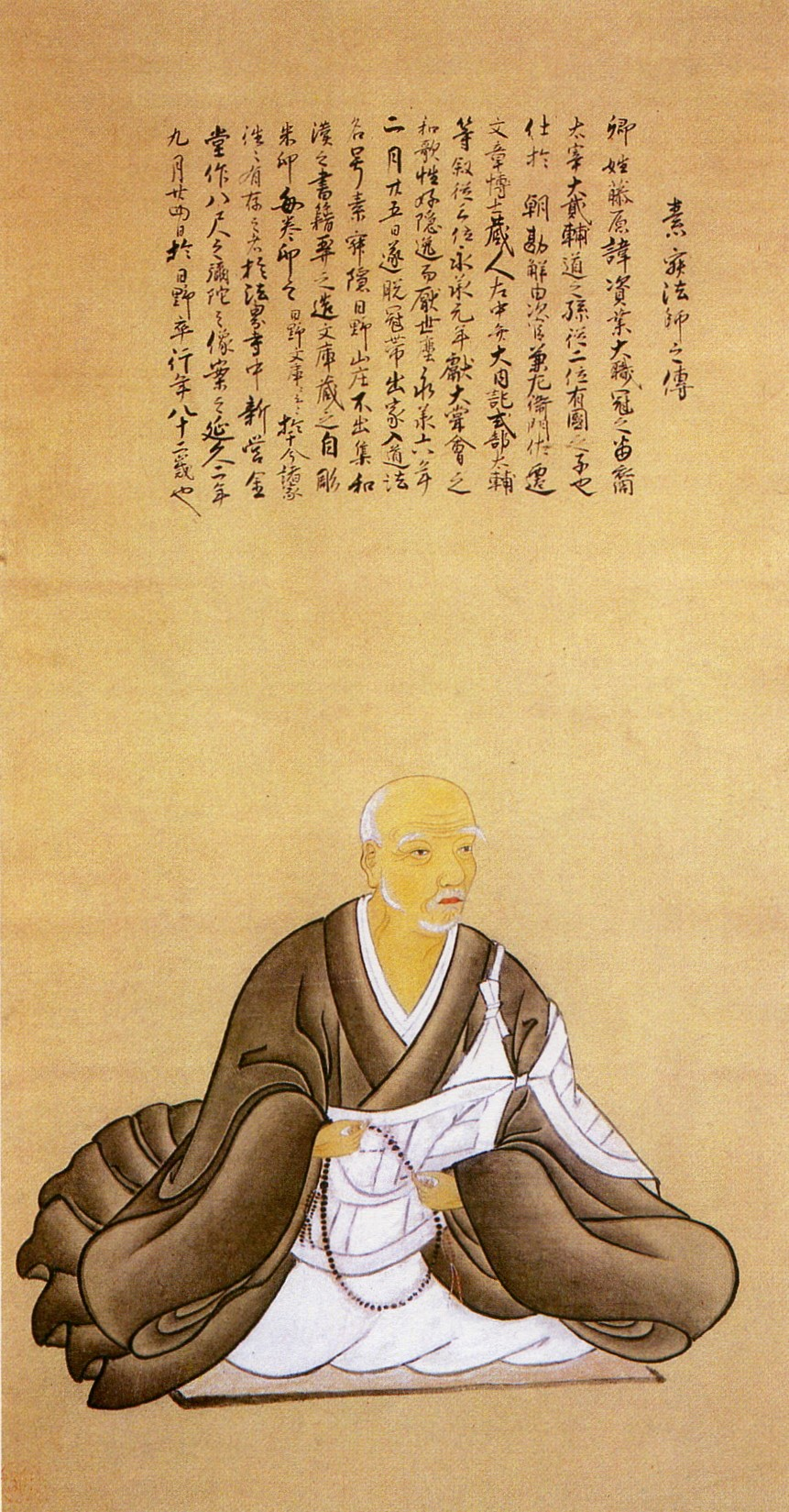 藤原(日野)資業の肖像画。